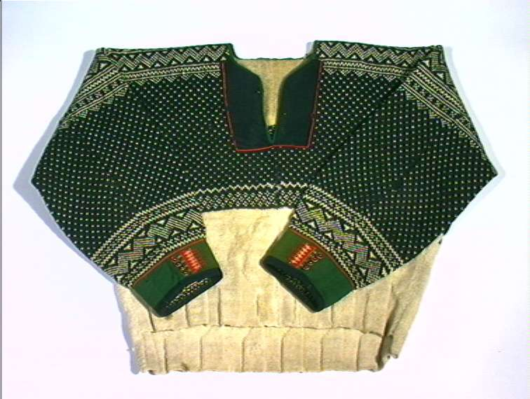 Lusekofte brukt i Bykle i Setesdal, Aust-Agder. Innkjøpt av Norsk Folkemuseum i 1911.